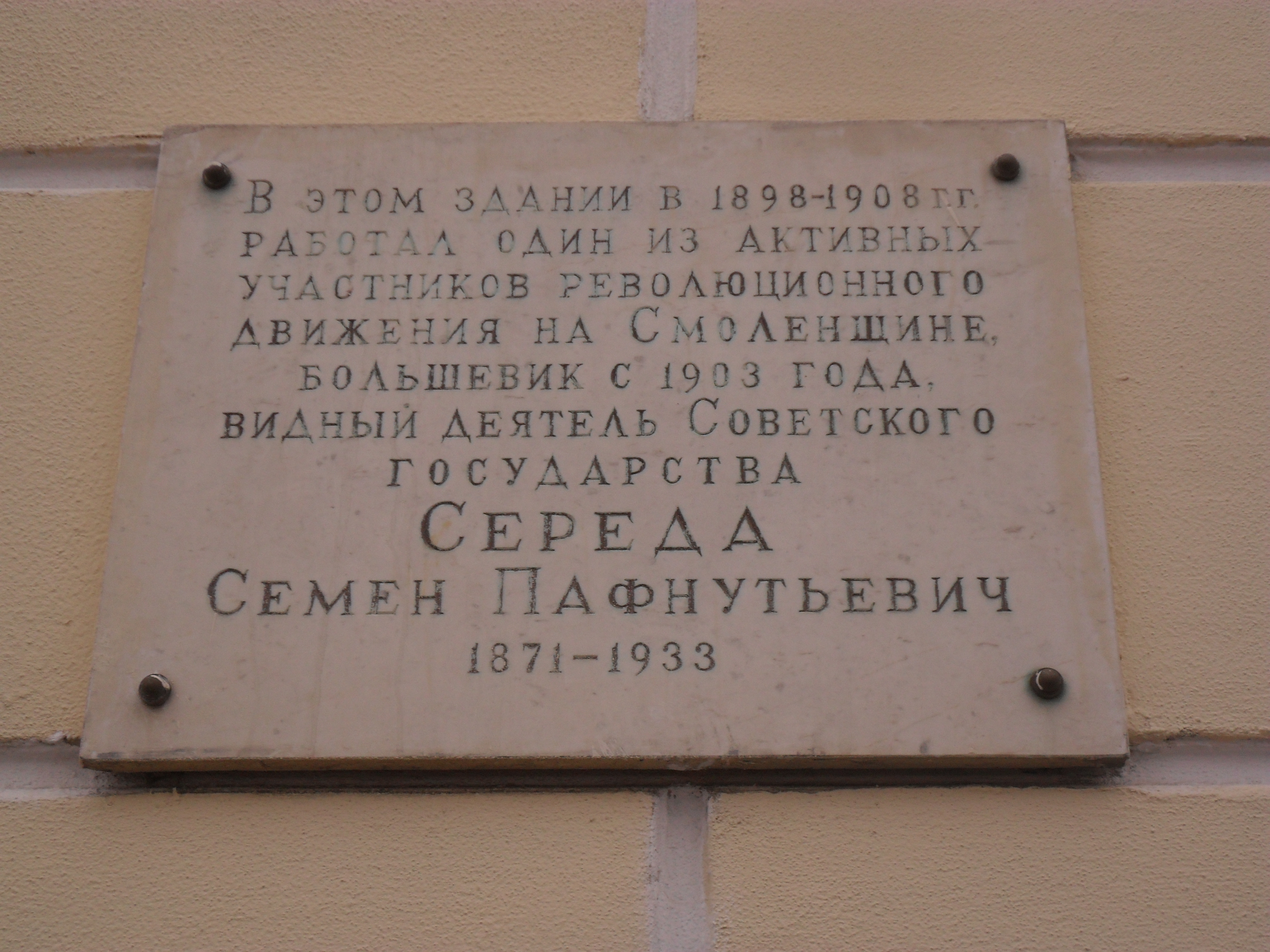 Мемориальная доска государственному деятелю Семёну Середе на улице Октябрьской Революции в Смоленске.